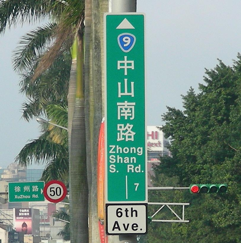 臺北市中正區中山南路路名標誌（直式）